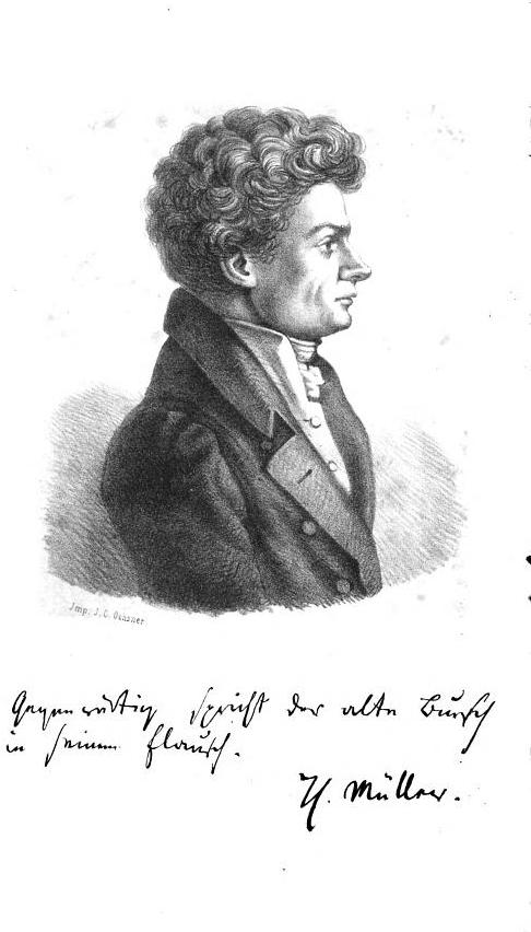 Porträt und Autograph von Theodor Müller, Frontispiz in Karl Theodor Pabst: Der Veteran von Hofwyl. Band 1. Theodor Müllers Jugendleben in Mecklenburg und Jena, Aarau: Sauerländer 1861